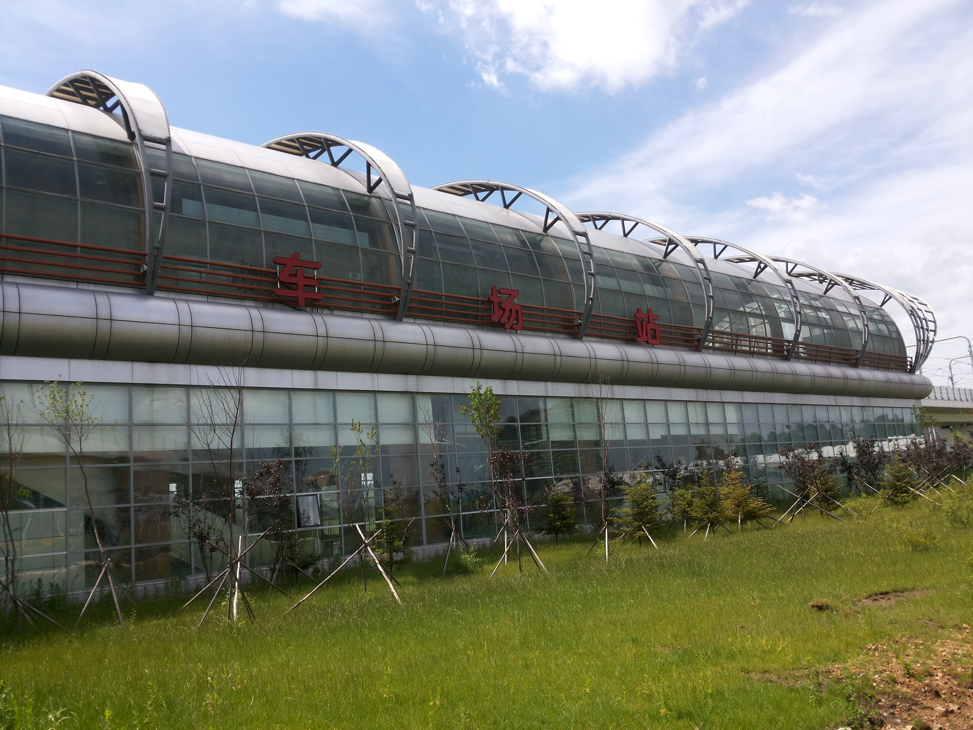 7月5日在车场站拍摄的外景。